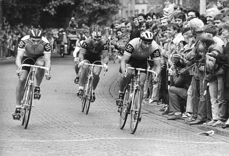 Olaf Ludwig, D. Abdushaparow, Uwe Raab ADN-ZB Kasper 11.5.87 ma-Gera: 40. Internationale Friedensfahrt-3. Etappe von Magdeburg nach Gera über 186 km. Der Träger des Gelben Trikots, Uwe Raab (r.), entscheidet den Prämienspurt in Kettstadt (km 58) vor seinem Mannschaftskameraden Olaf Ludwig (l.-beide DDR). Dritter wurde Dshamolidin Abdushaparow (UdSSR-Mitte).